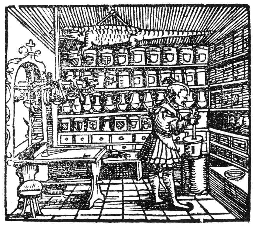 Hofapotheker, nach: $Ryff$, Walther: Confect Büchlin vnd Hausz Apoteck.